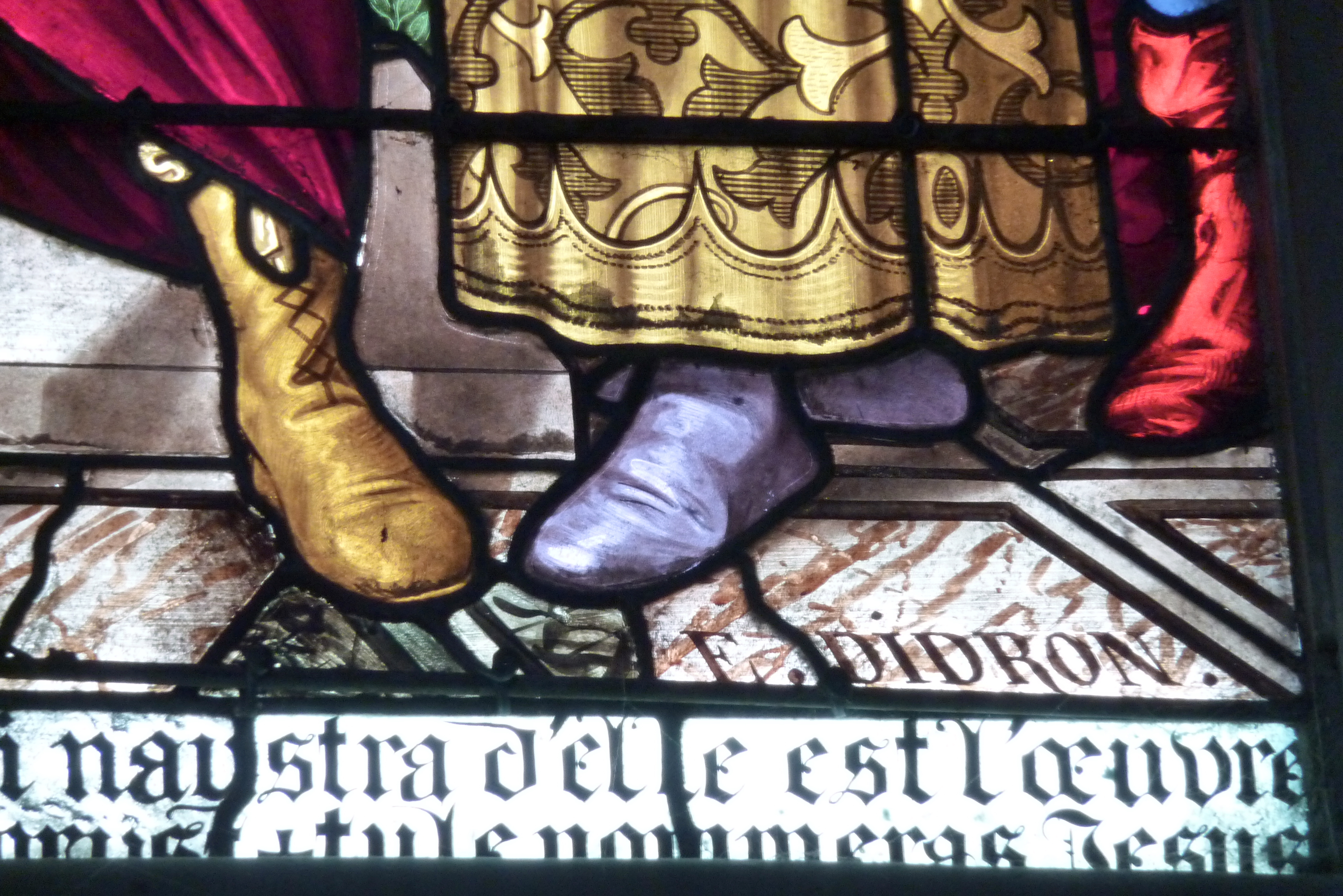 Bleiglasfenster (Ausschnitt) in der Kathedrale Saint-Maclou in Pontoise, Darstellung: Signatur "E: DIDRON"